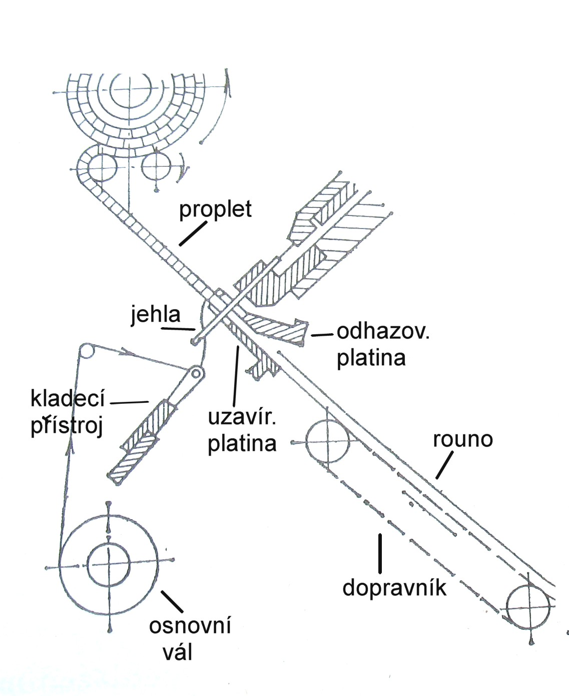 Schema: Nähwirkmaschine Arachne